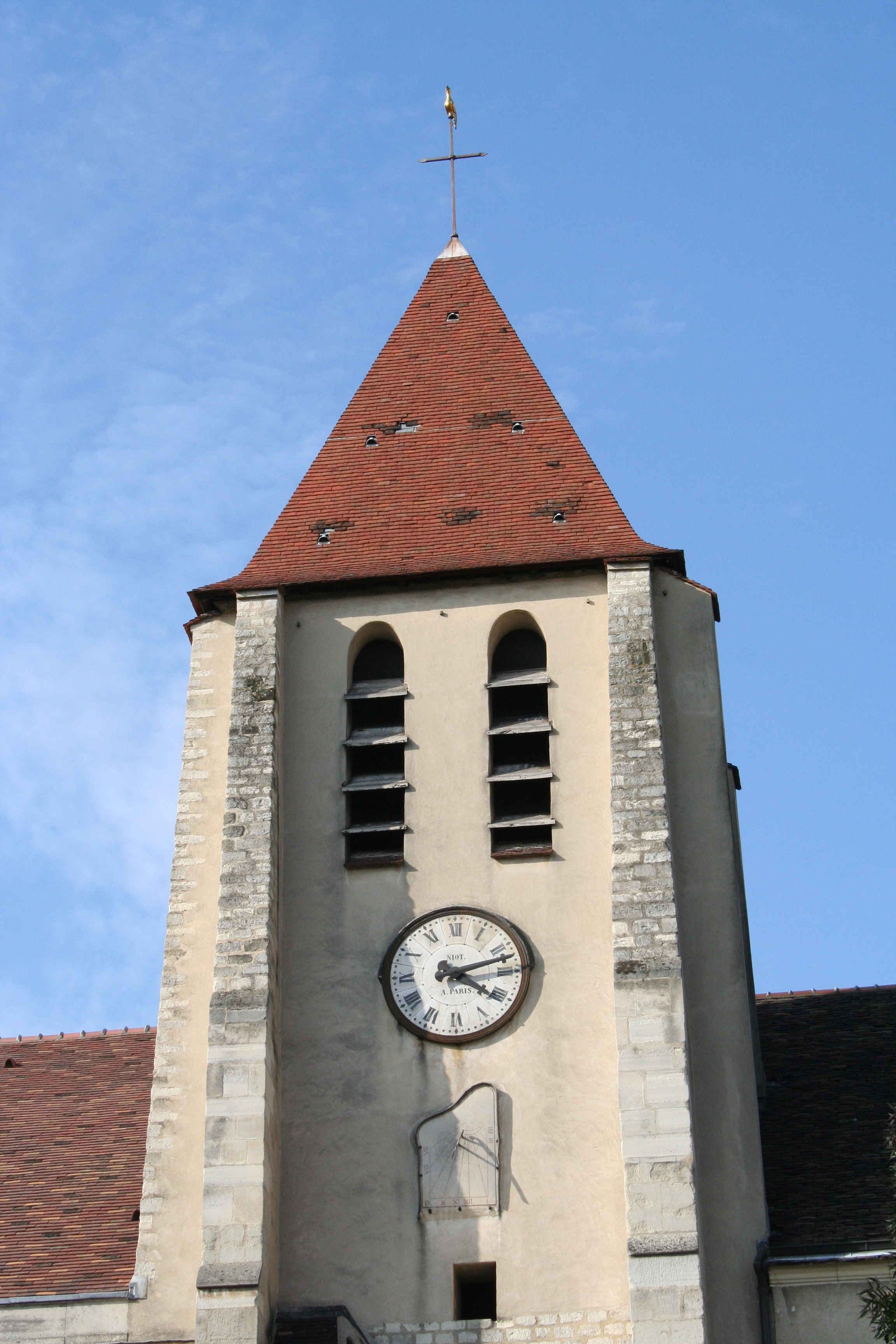 Église Saint-Germain-de-Charonne - Paris 20 - France .